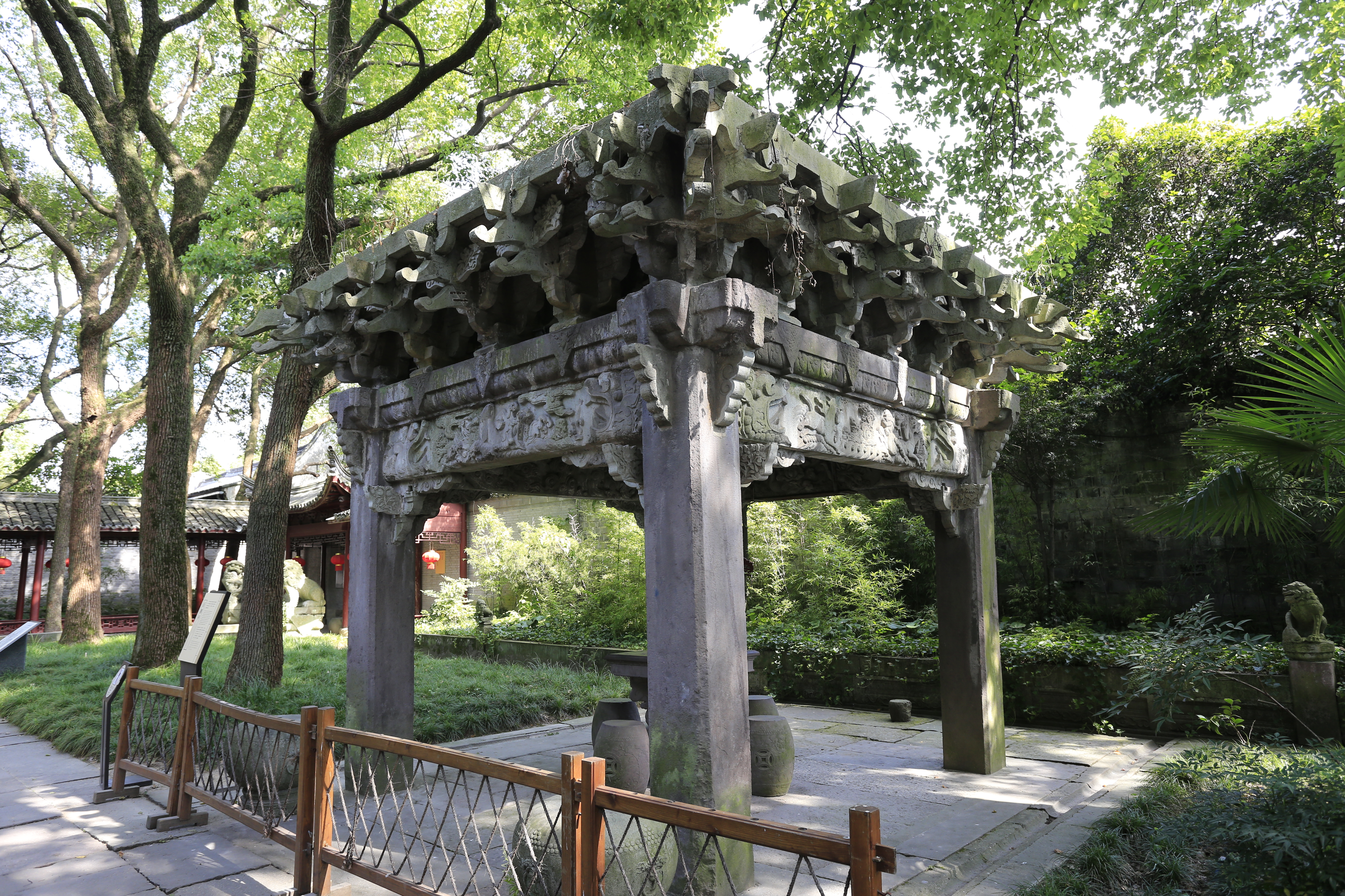 宁波天一阁 —— 百鹅亭